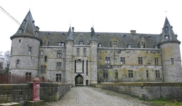 Schlass vu Fallais.